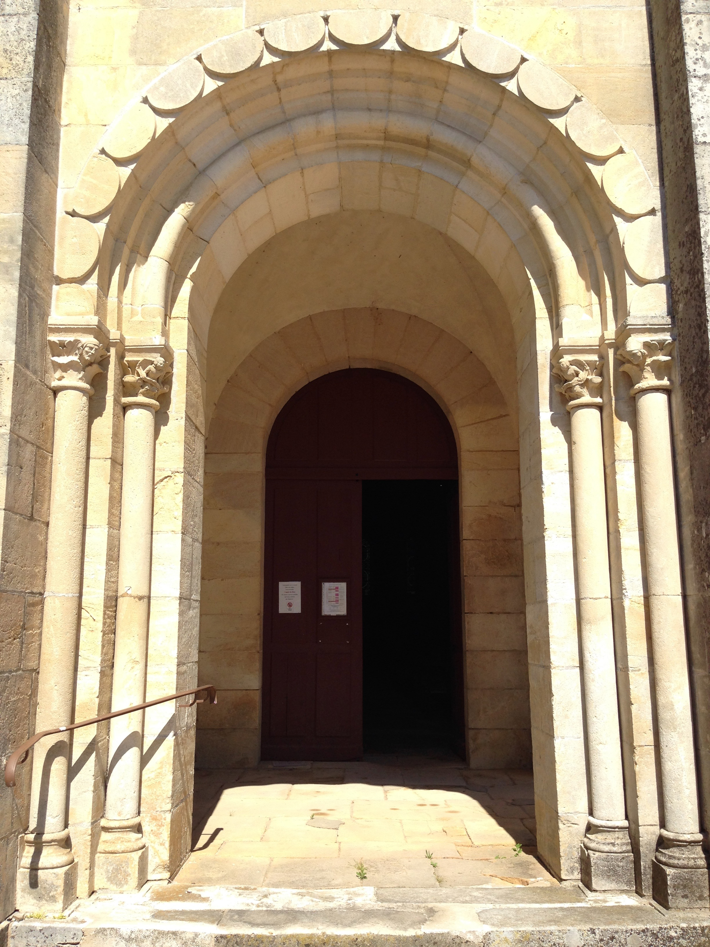 Saulzais-le-Potier Portail de l'église